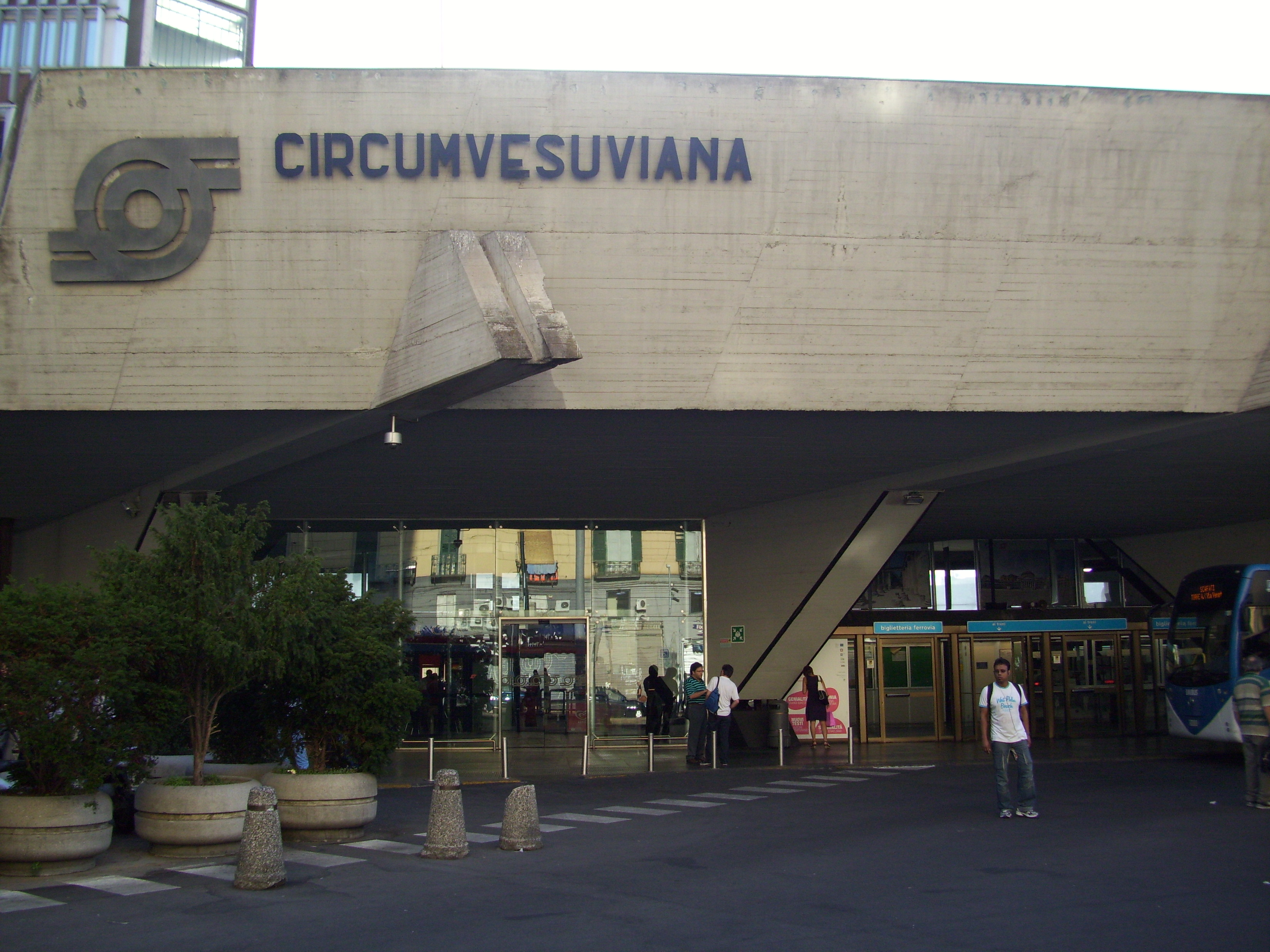 l'esterno della stazione di Napoli Porta Nolana